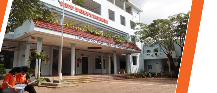 Cao đẳng thực hành FPT Polytechnic Tây Nguyên